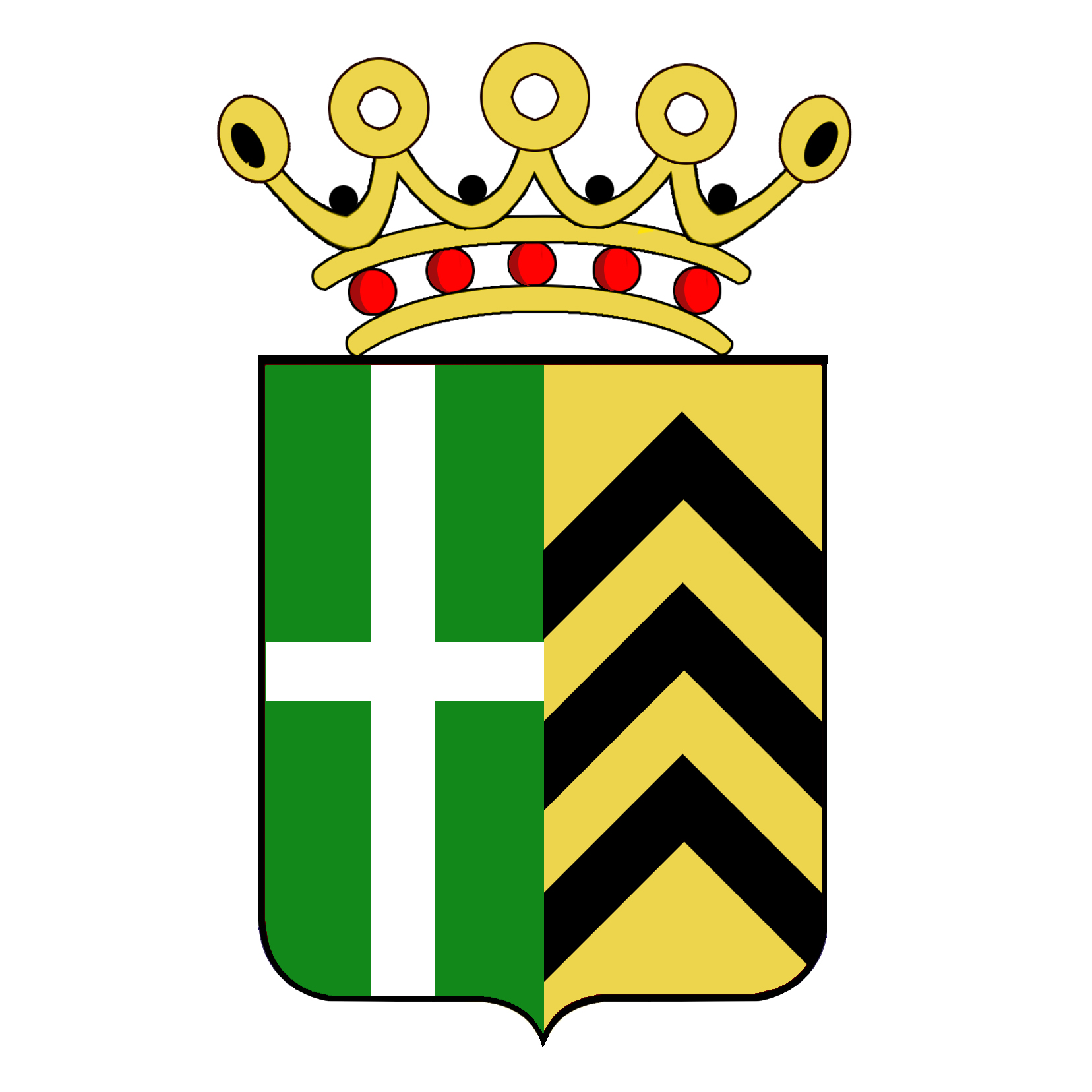 Ecu timbré de Soignies